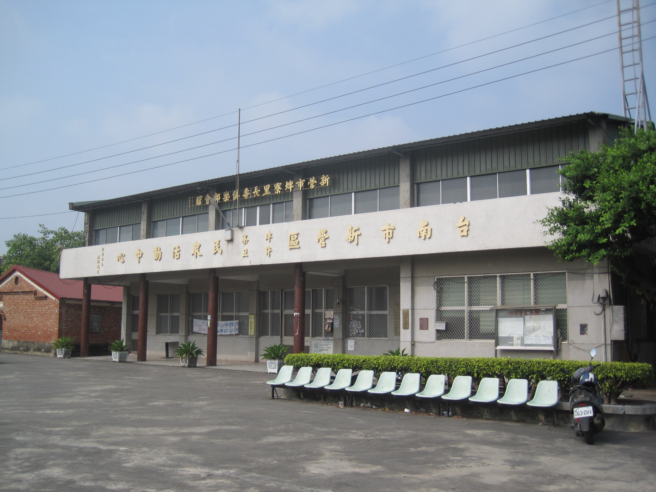 中文（台灣）: 新營區埤寮許丑民眾活動中心